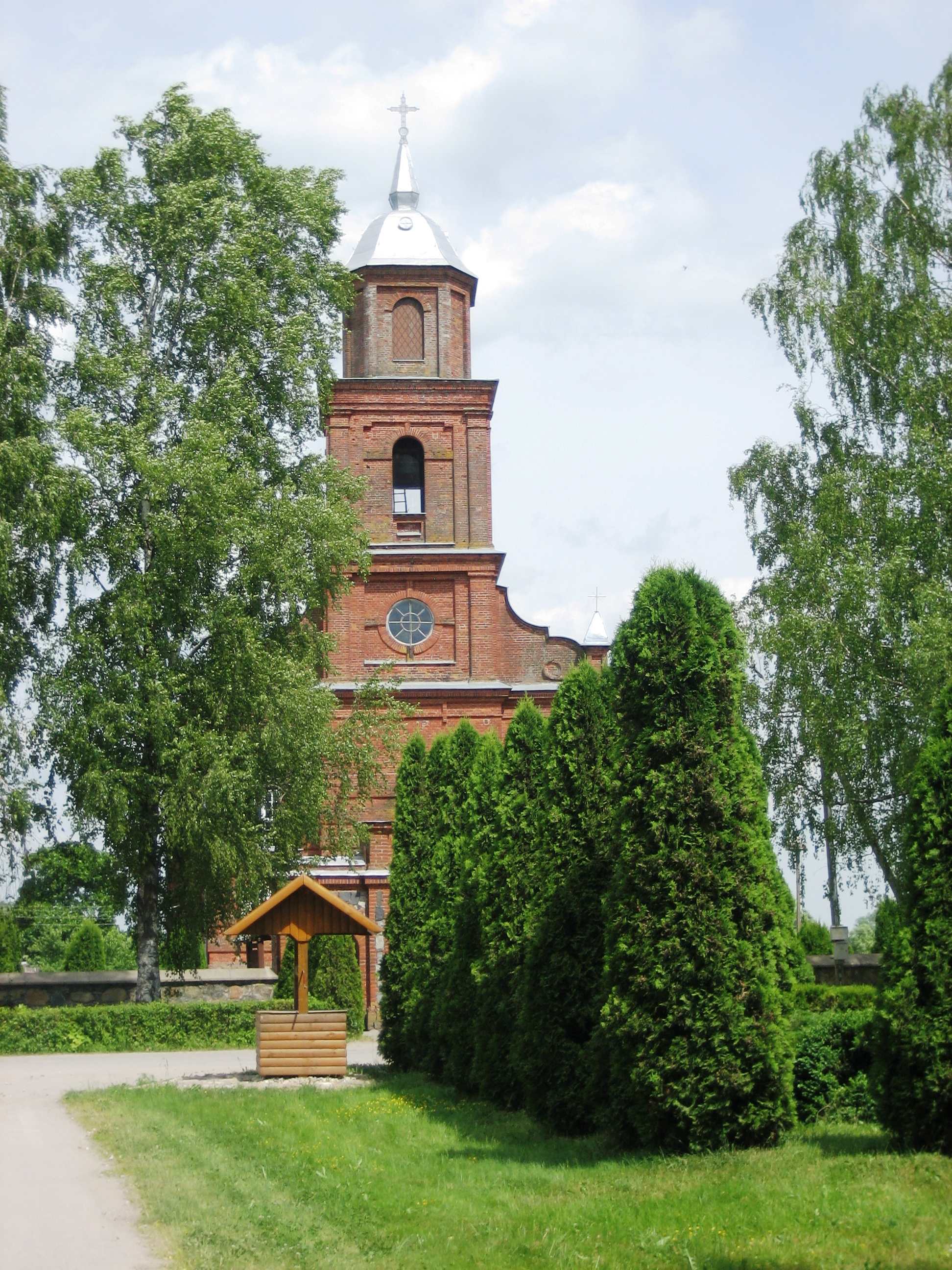 Žemaitkiemio Šv. Kazimiero bažnyčia